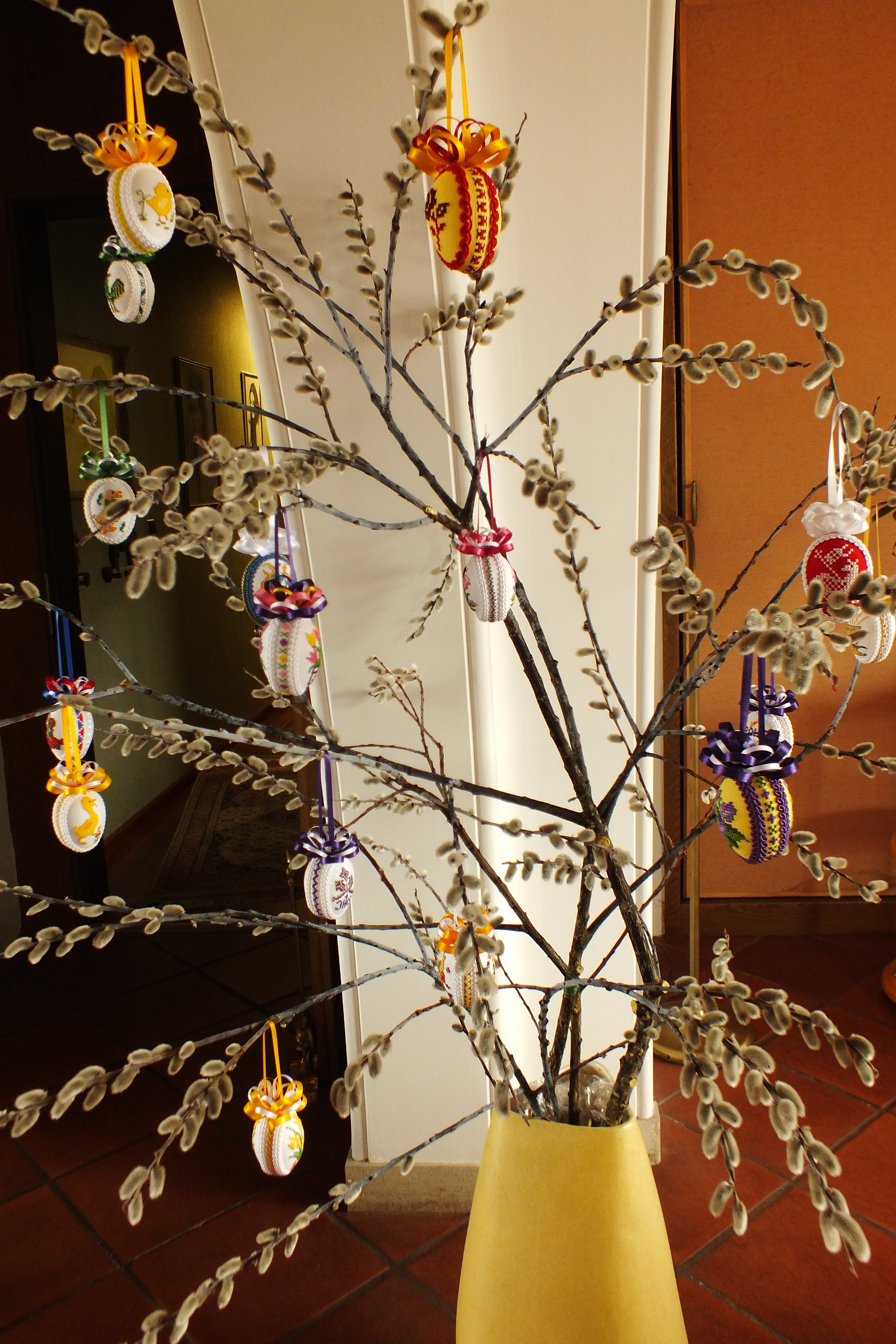 Osterstrauch mit bestickten Ostereiern, Kreuzstich, Pfaffing, Oberbayern, 2016